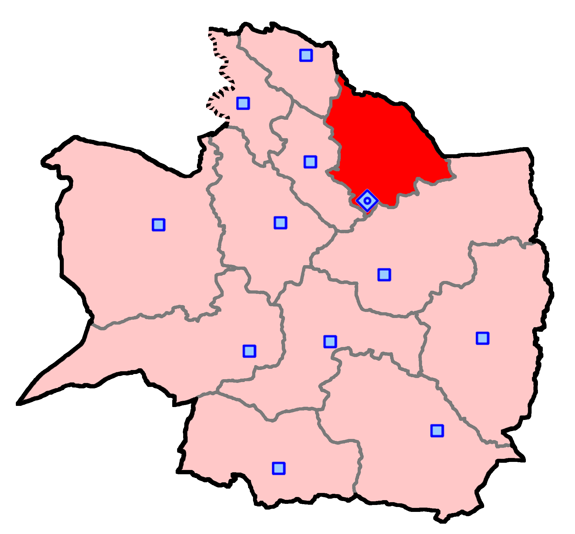 حوزهٔ انتخاباتی مشهد برای انتخابات مجلس شورای اسلامی